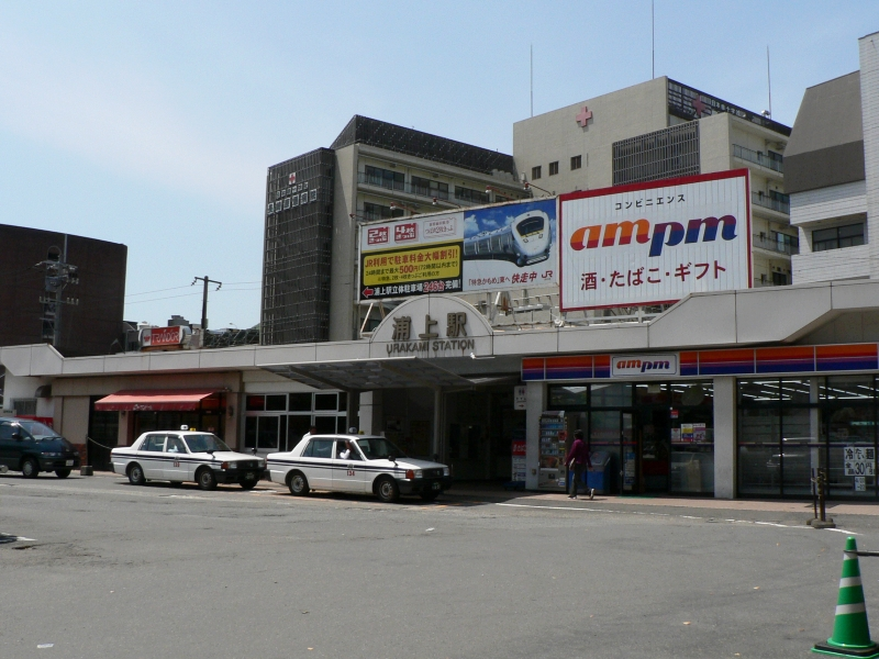 JR長崎本線の浦上駅(長崎県長崎市)